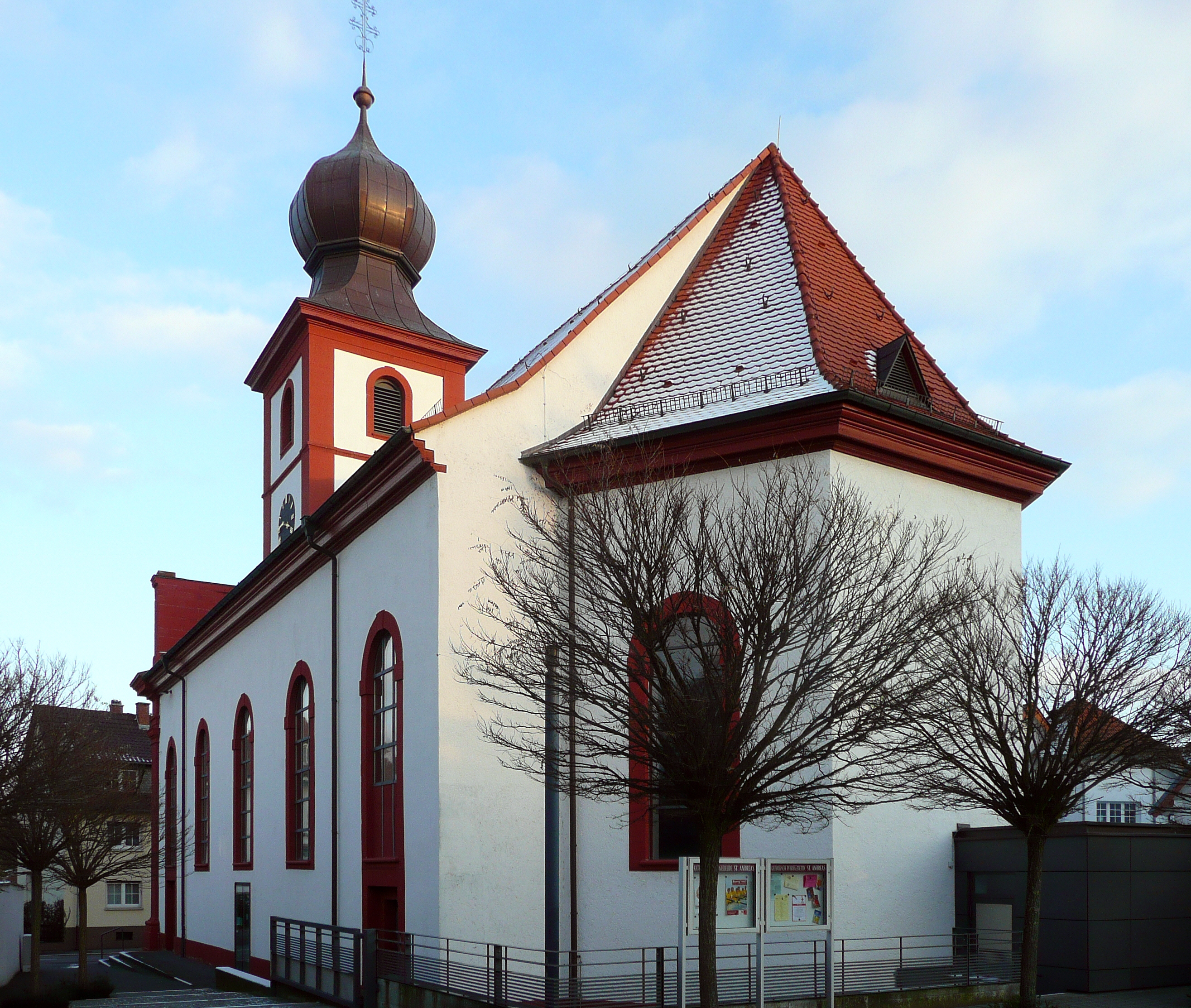 Alte katholische Pfarrkirche St. Michael in Neckarhausen (Ortsteil von Edingen-Neckarhausen, Baden-Württemberg, Deutschland); erbaut 1781 nach Plänen von Jakob Arnold Dyckerhoff, 1783 dem Heiligen Andreas geweiht, nach schweren Beschädigungen durch Eisgang umfangreiche Reparaturen 1784, umfangreich restauriert 1932, 1960 Übertragung des Patroziniums auf den dahinterliegenden Kirchenneubau, Profanbau wird dem Heiligen Michael anvertraut, Renovierungsarbeiten 2002 bis 2004, seither Nutzung als Gemeindesaal